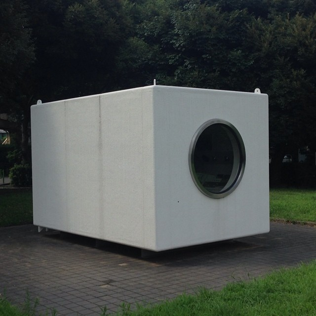 北浦和公園に展示された中銀カプセルタワービルのカプセル。